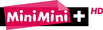 Logo kanału minimini+ HD (2011)